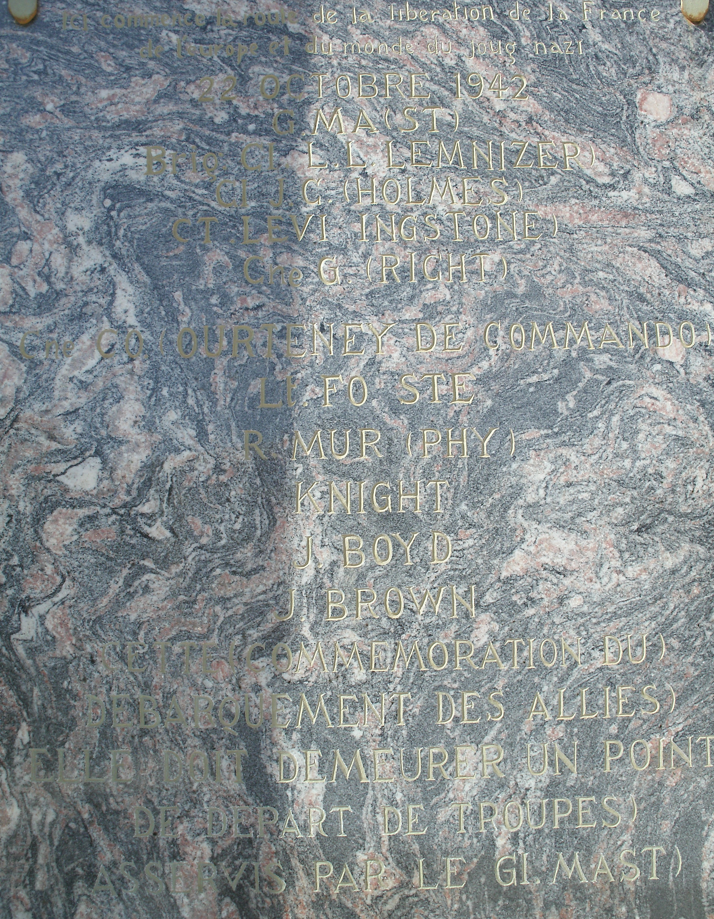 Stèle de Mousselmoun. Table en marbre gravée en souvenir de l'opération Flagpole.